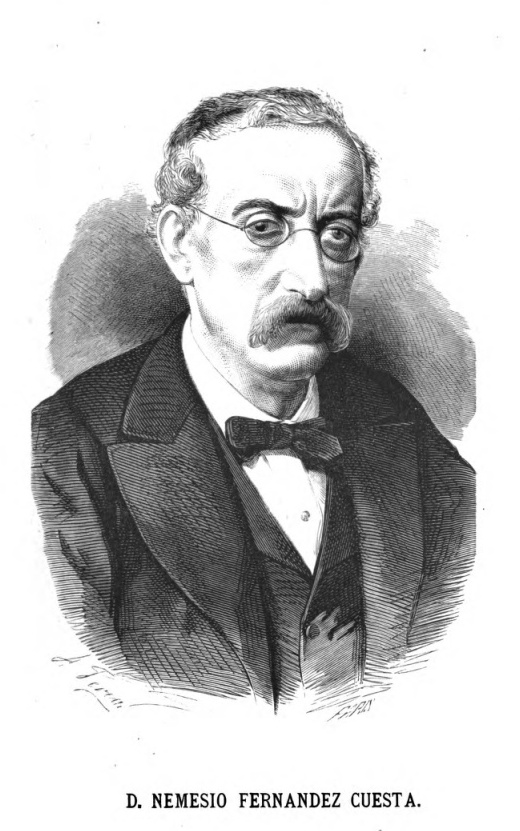 Nemesio Fernández Cuesta, grabado de Marcelo París por dibujo de Alfredo Perea: Carlos Rubio, Historia filosófica de la revolución española de 1868, Madrid, 1868